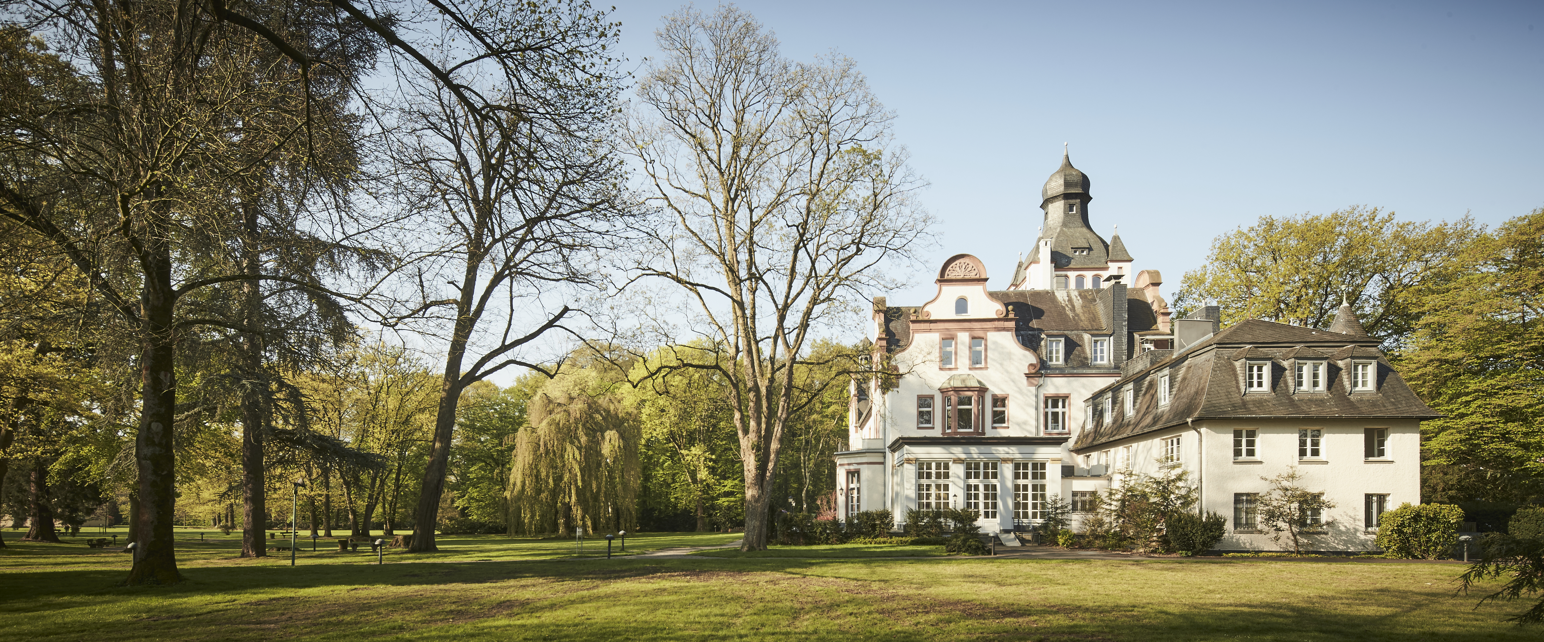 Das Gezeiten Haus Schloss Eichholz in Wesseling, Seitenansicht